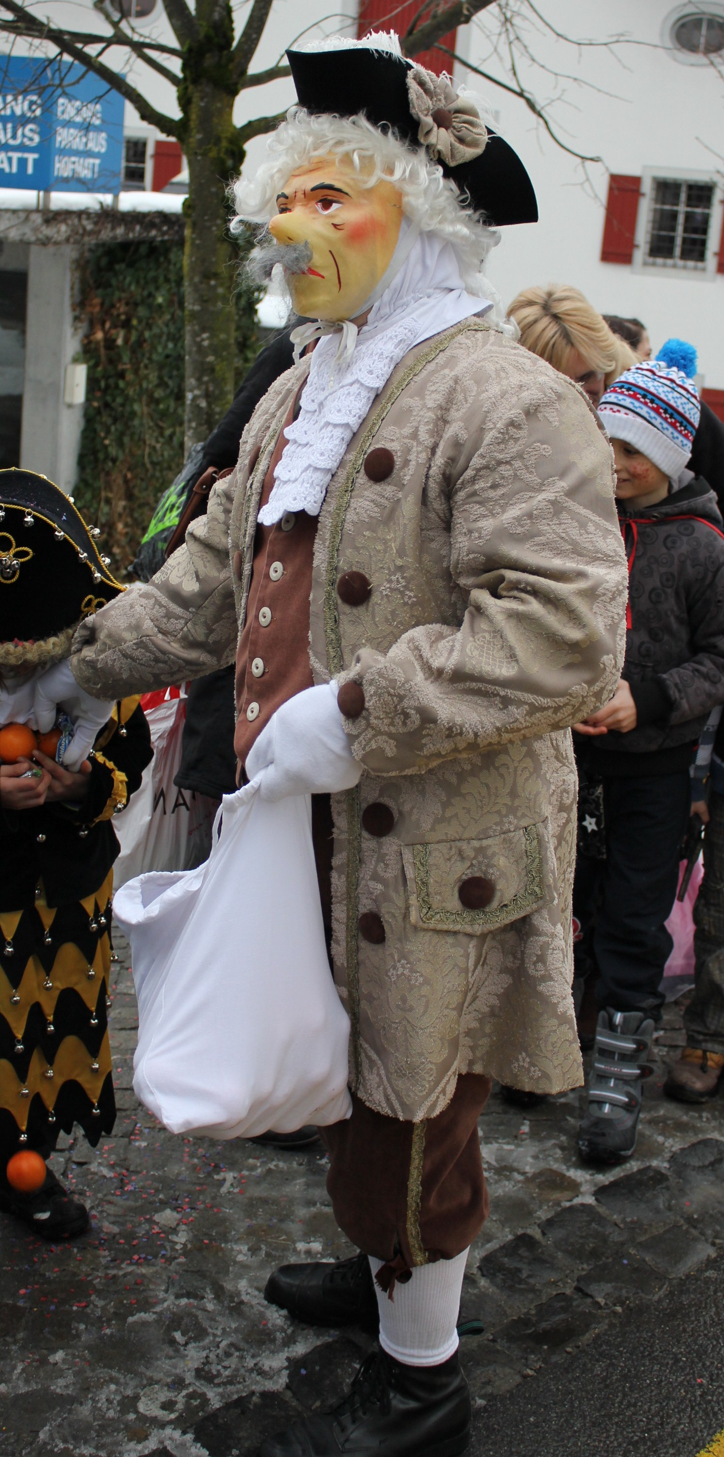 Der Alte Herr ist eine Fasnachtsfigur der Schwyzer Nüssler. Es handelt sich um einen alten Aristokraten mit Naturholzstock.